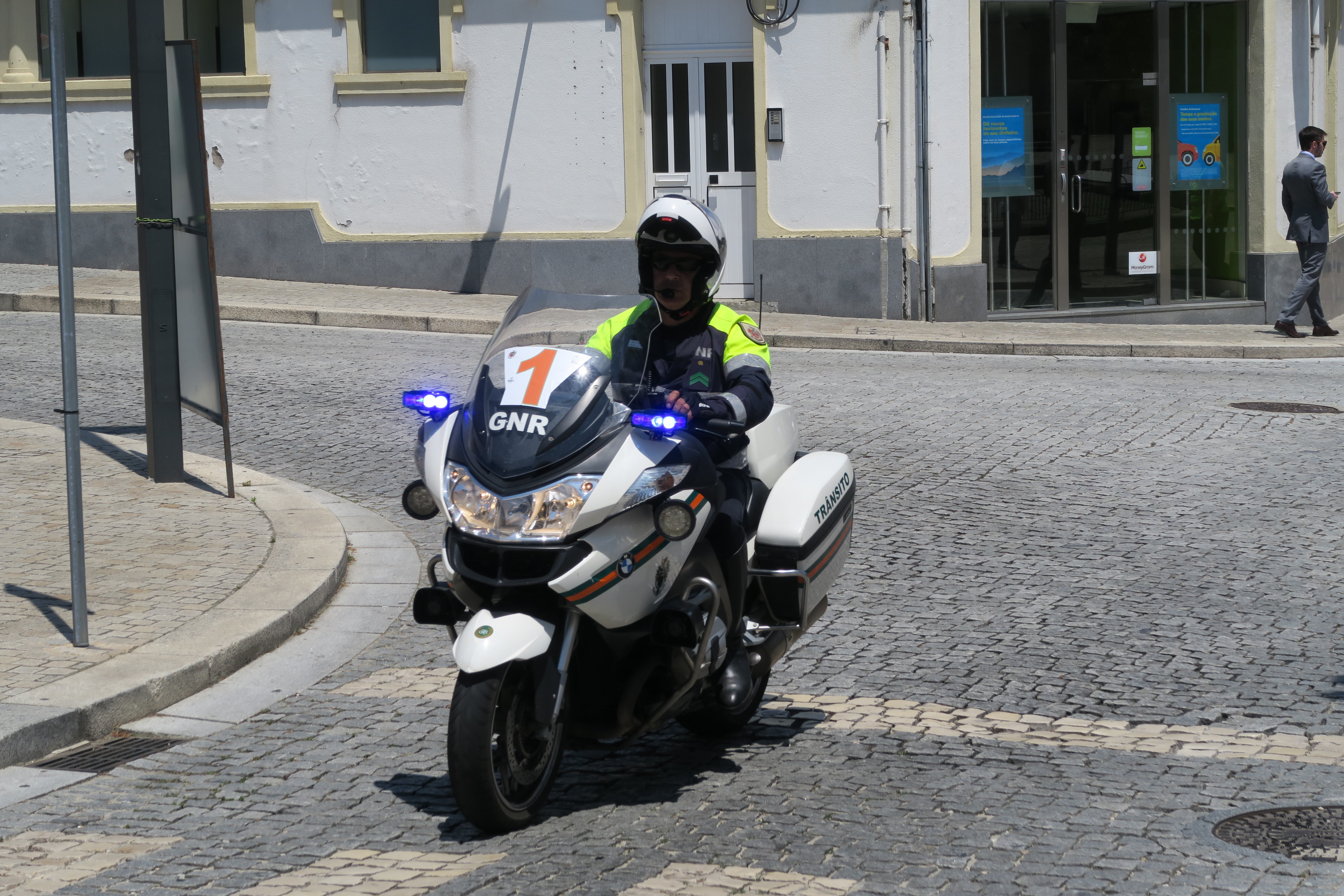 Grande Prémio de Portugal Nacional 2 (2018) Lamego